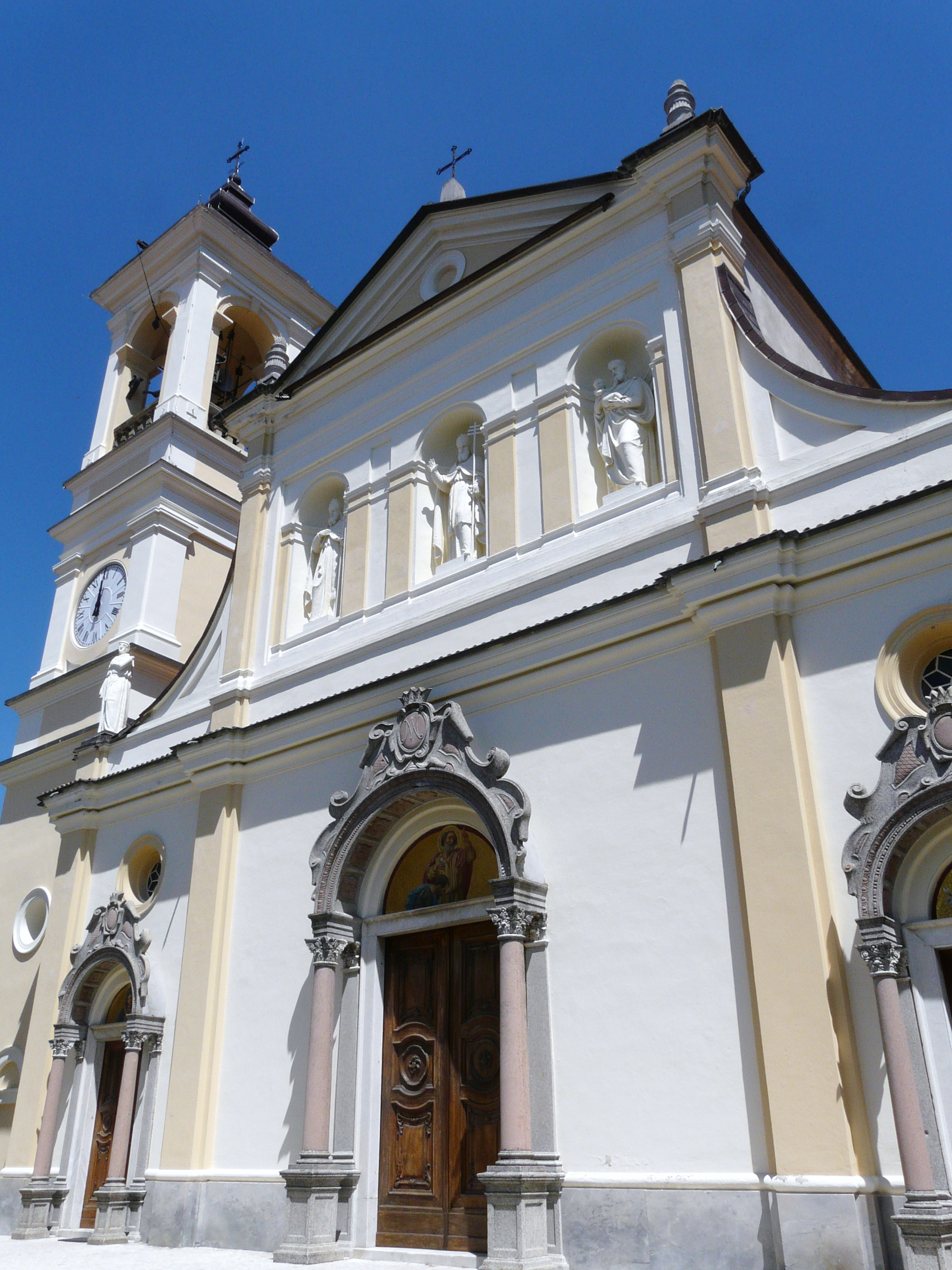 Chiesa di San Silvestro, Mornese, Piemonte, Italia